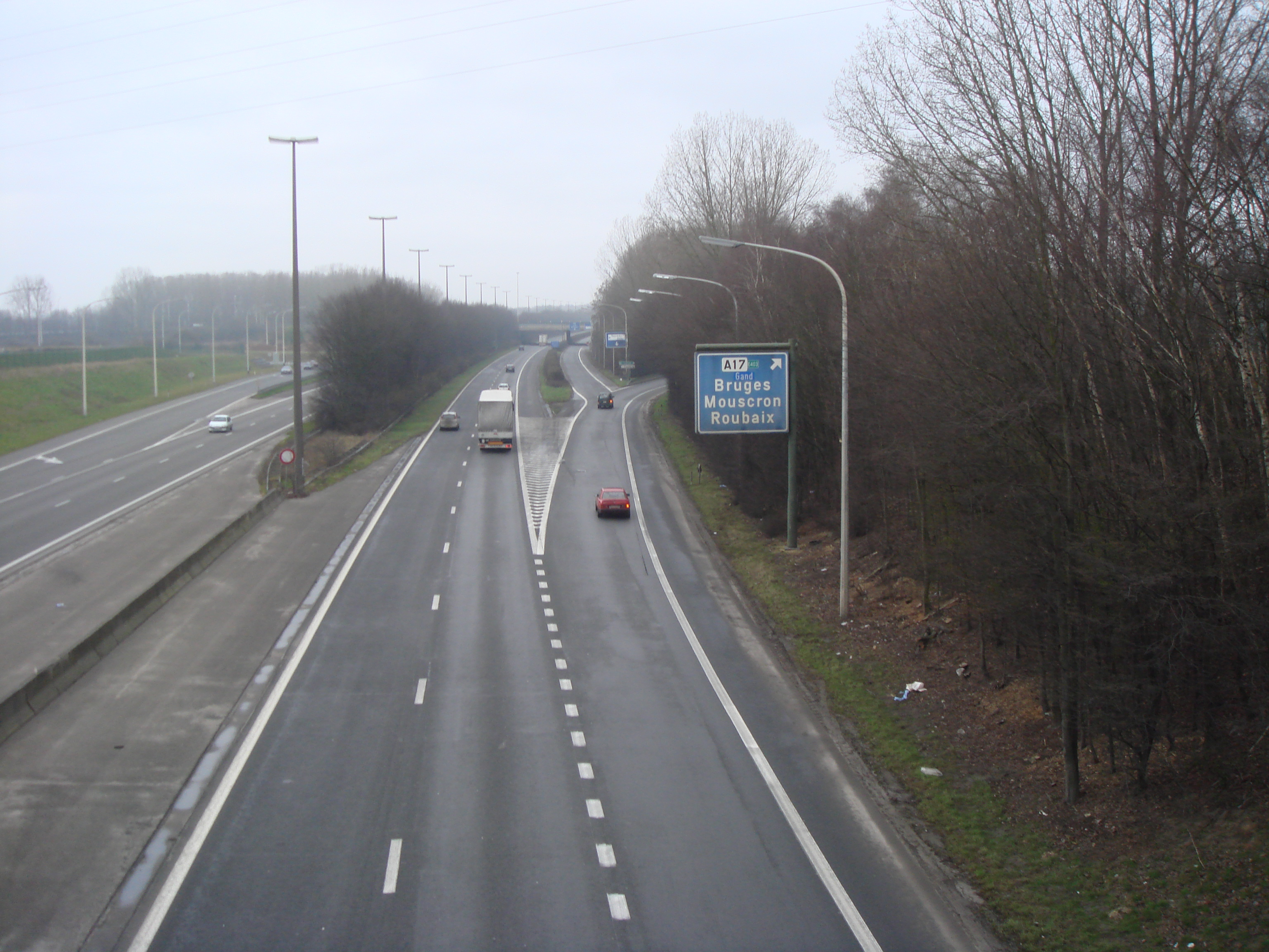 Autoroute E42 au niveau de Tournai en Belgique